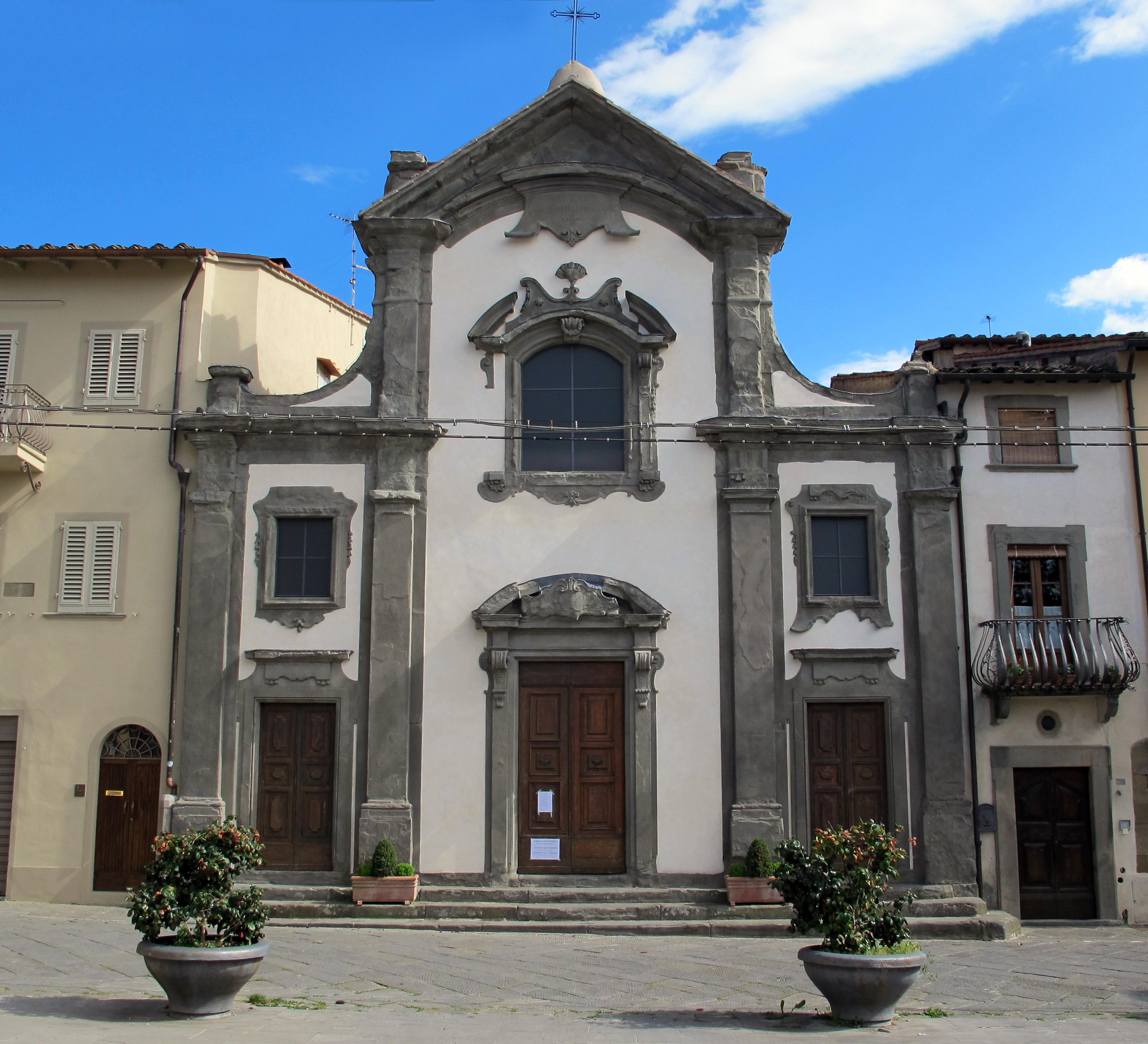 Castelfranco di Sopra